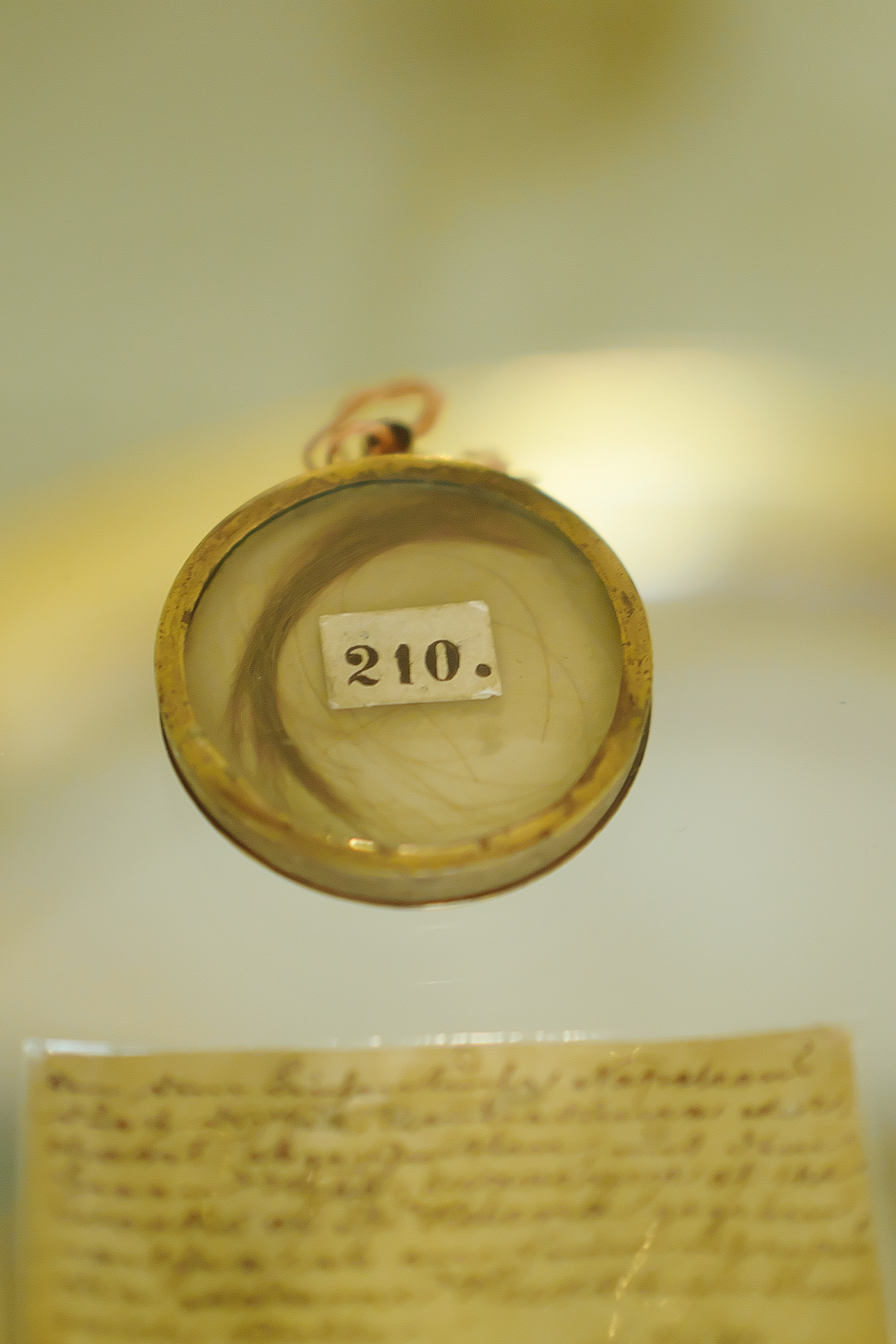 Dose mit Haarsträhne von Napoleon Bonaparte im Schloss Königswart in Böhmen